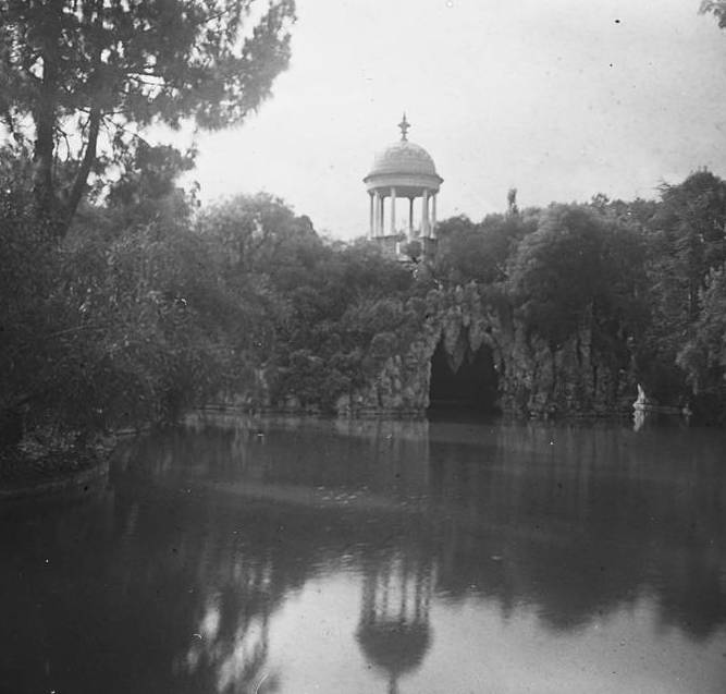 Llac i templet de Torre Blanca a Sant Just Desvern. Josep Salvany i Blanch (1922)